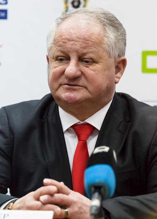 Главный тренер донецкого «Донбасса» Юлиус Шуплер на пресс-конференции после матча чемпионата КХЛ против хабаровского «Амура» 30 января 2013 года.